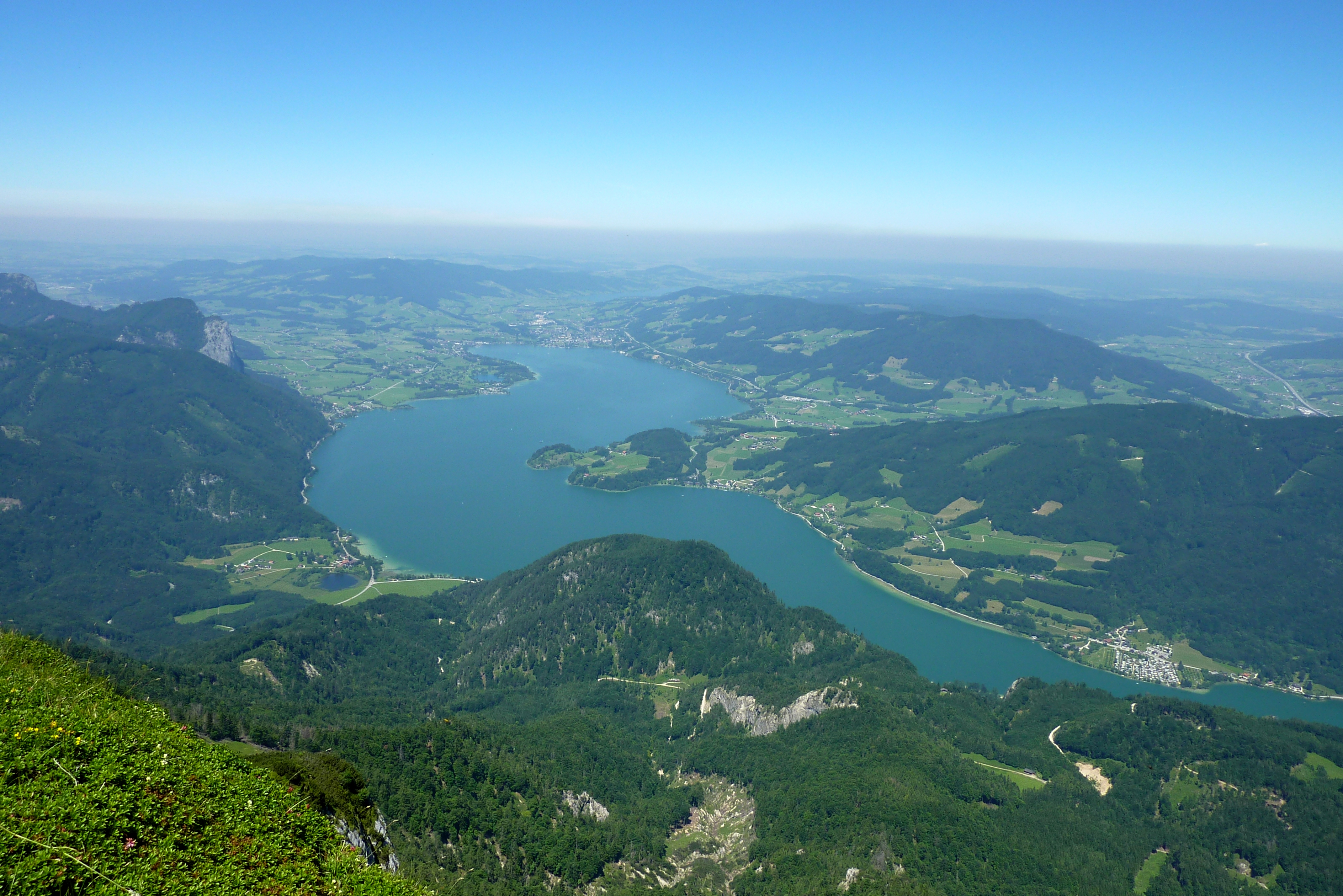 Mondsee, vom Schafberg aus gesehen